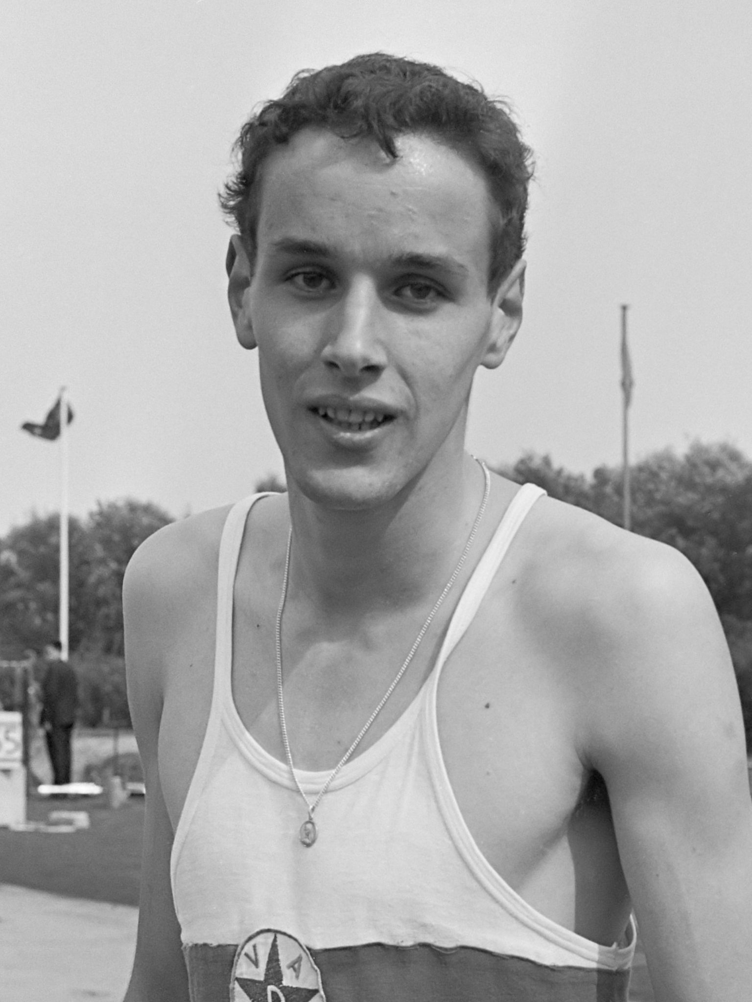 Nederlandse atletiek Beverwijk, finale 400 meter Frits van Herpen (kop) 23 augustus 1964